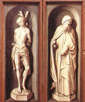 Das jüngste Gericht geschlossener Zustand - (The Last Judgement - closed)